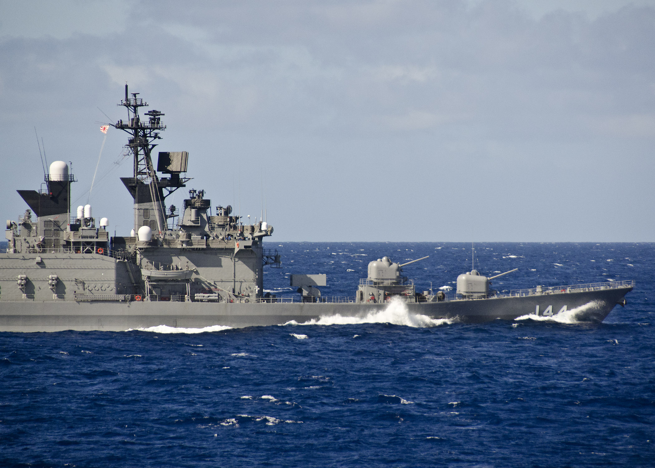 太平洋を航行する護衛艦くらま。多国間共同訓練コアカイ12-1に参加中。